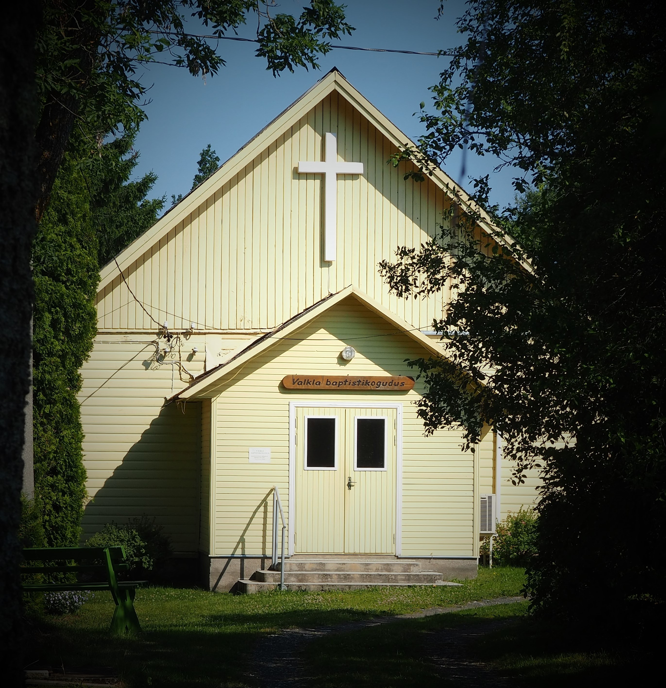 Valkla Baptistikoguduse hoone